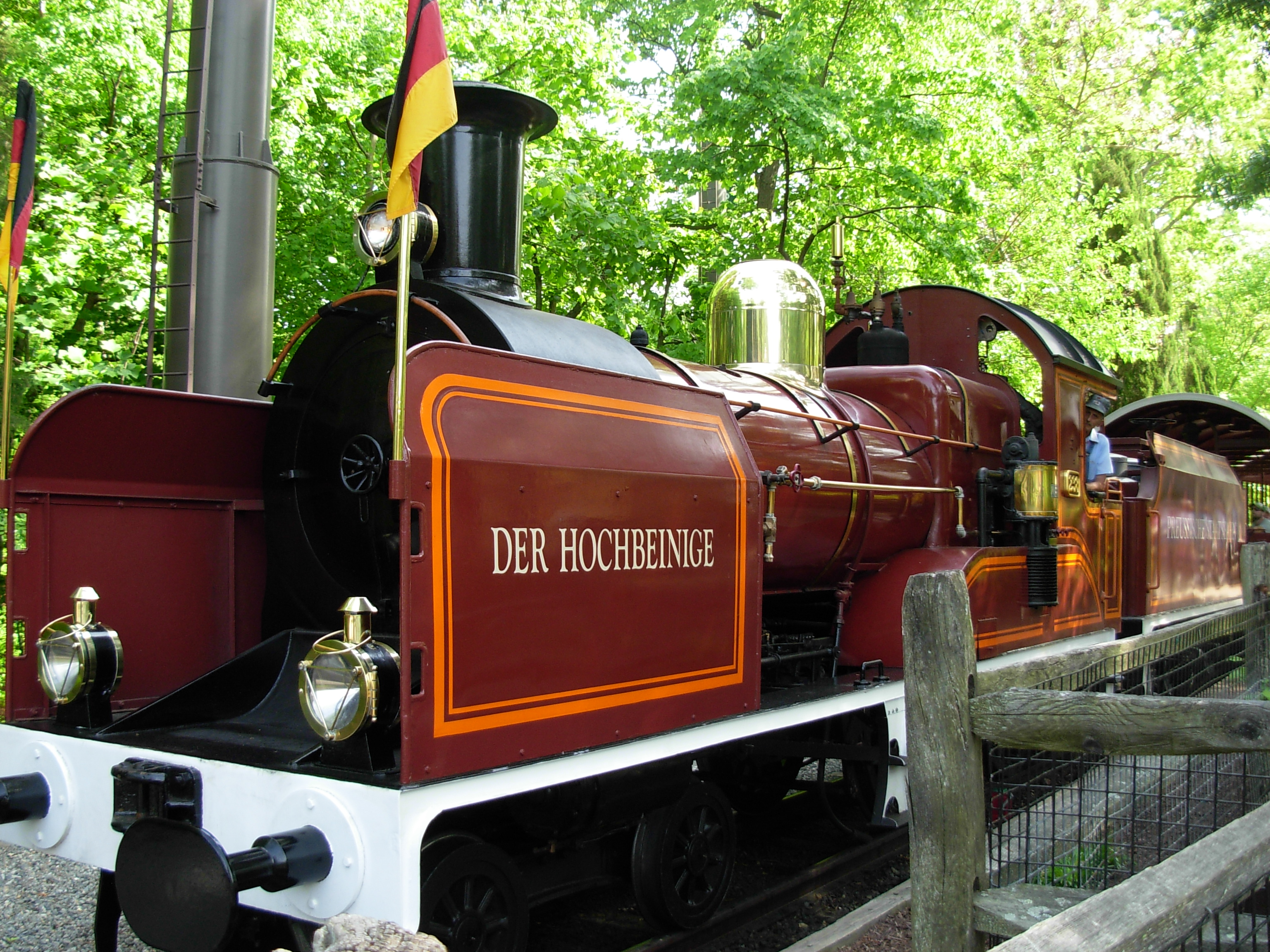 Busch Gardens Europe, Williamsburg Roller coasters Amusement rides